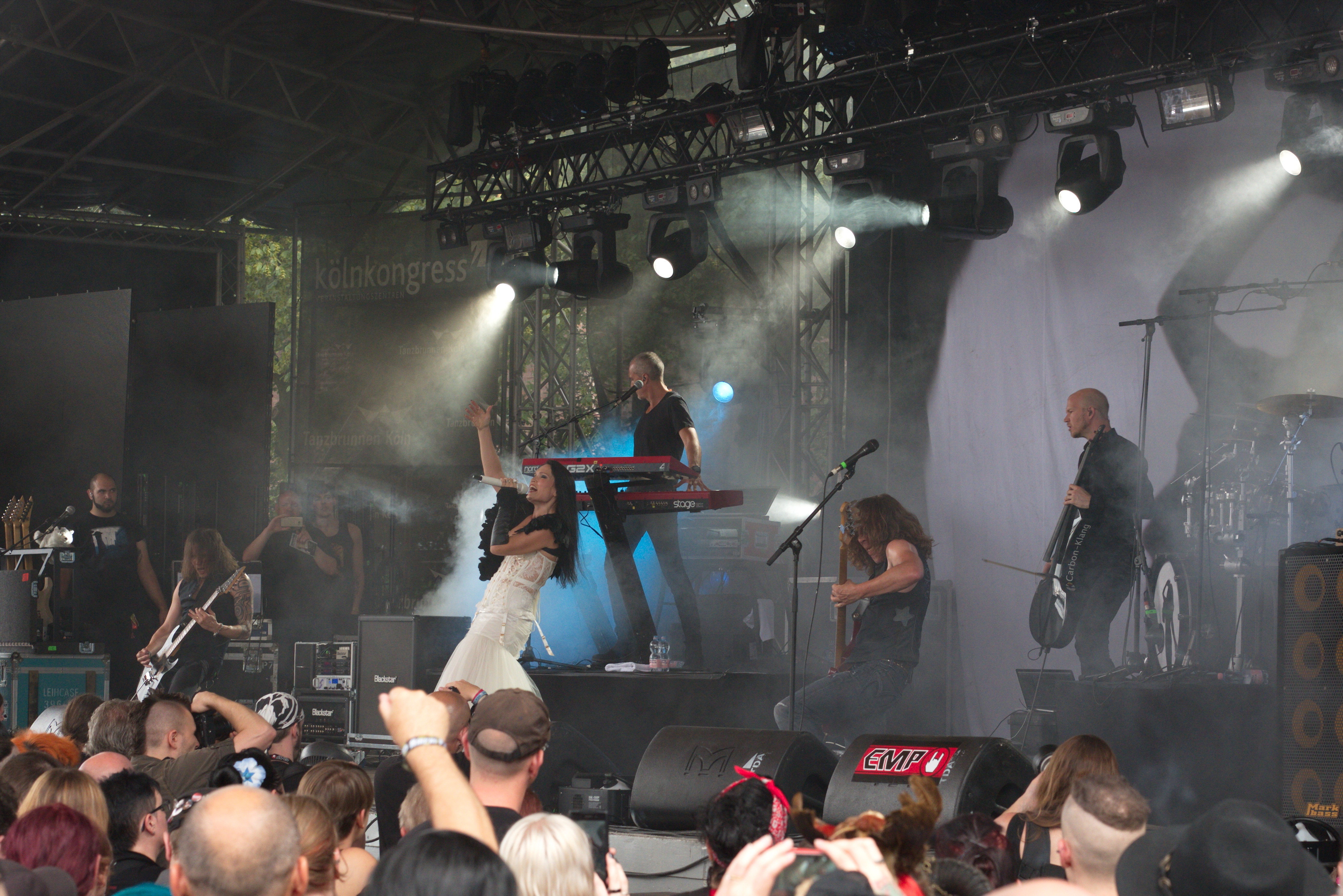 Tarja, Amphi festival 2016